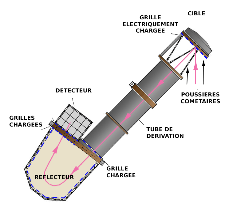 Cometary and Interstellar Dust Analyzer (CIDA) instrument used on the stardust spacecraft. The instrument intercepts dust and performs real-time compositional analysis for transmission back to Earth.